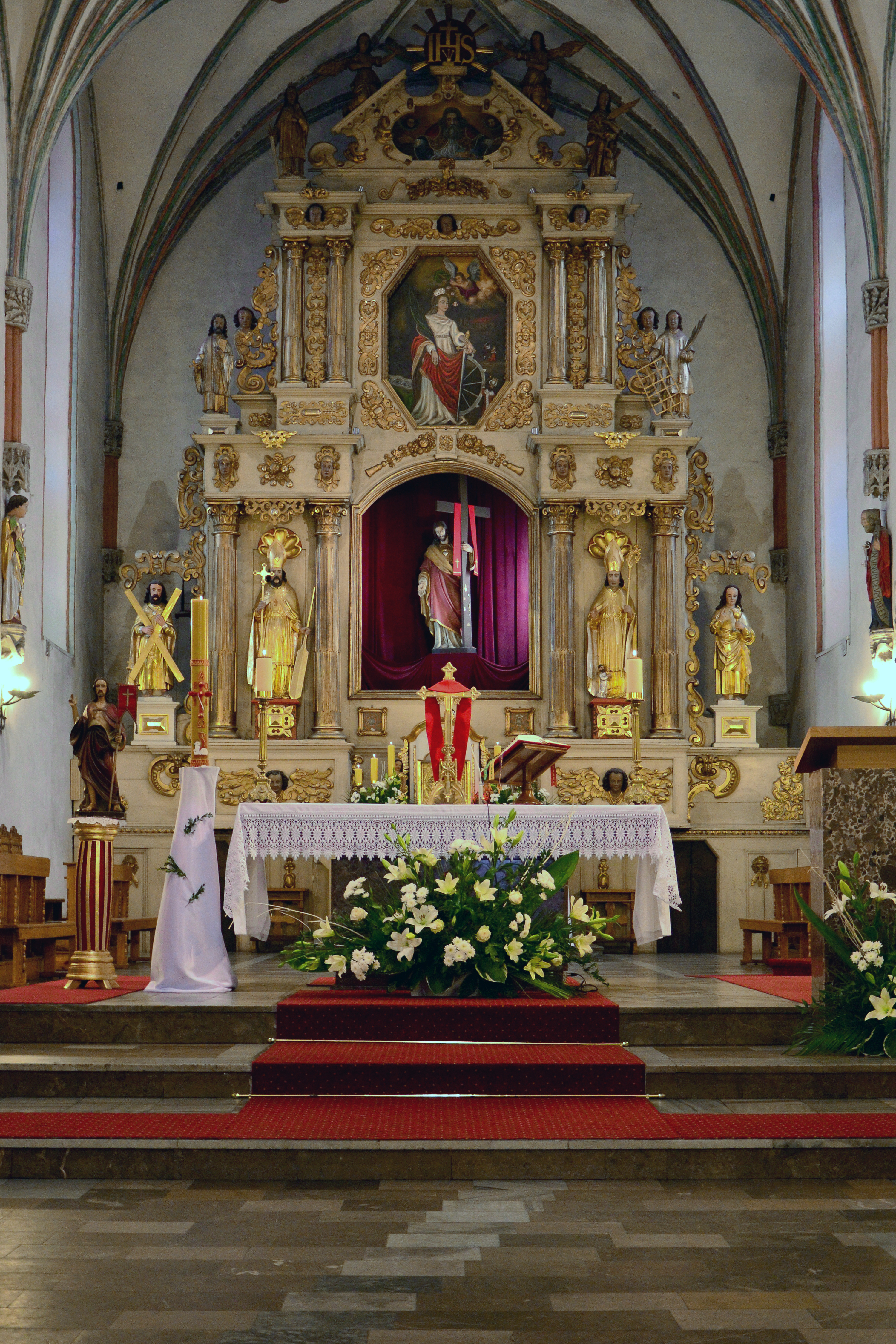 Brodnica, ul. Farna - rzymskokatolicki kościół parafialny pw. św. Katarzyny, 1285-XIV